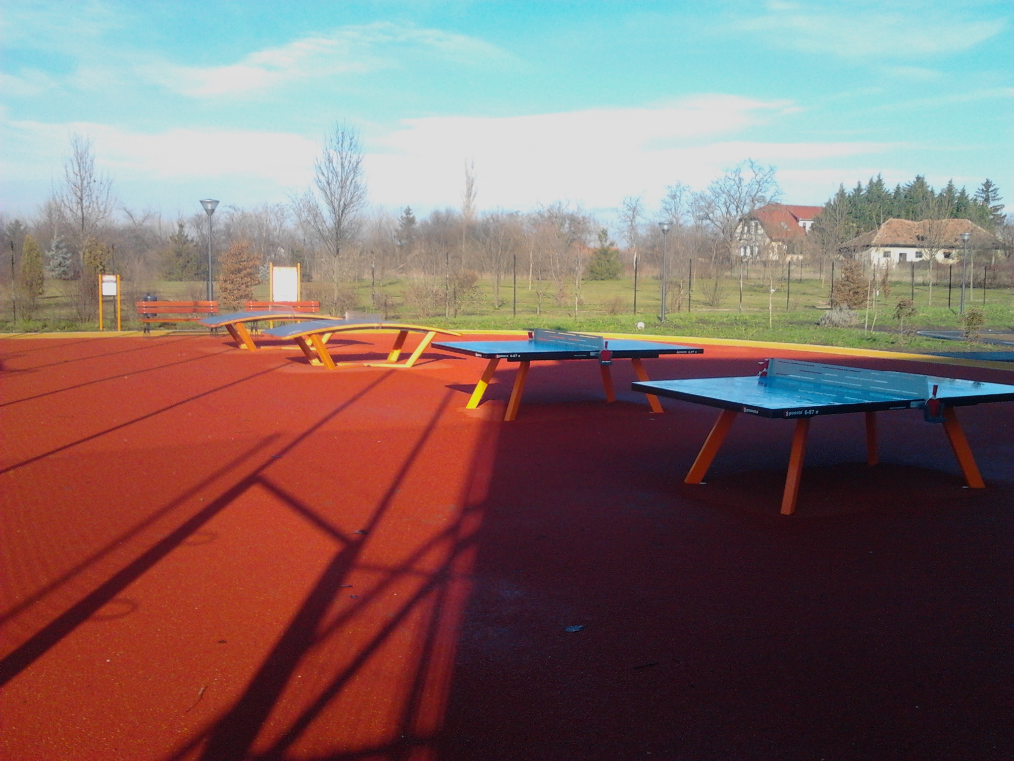 A maklári sportcentrum teqball és asztalitenisz-asztalai.